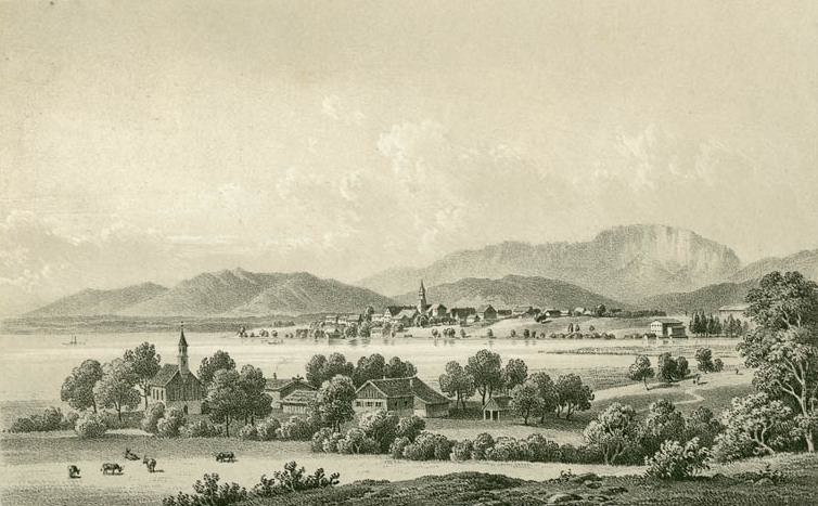 Seeshaupt am Starnbergersee, getönte Kreidelithographie Verlag Max Ravizza, München